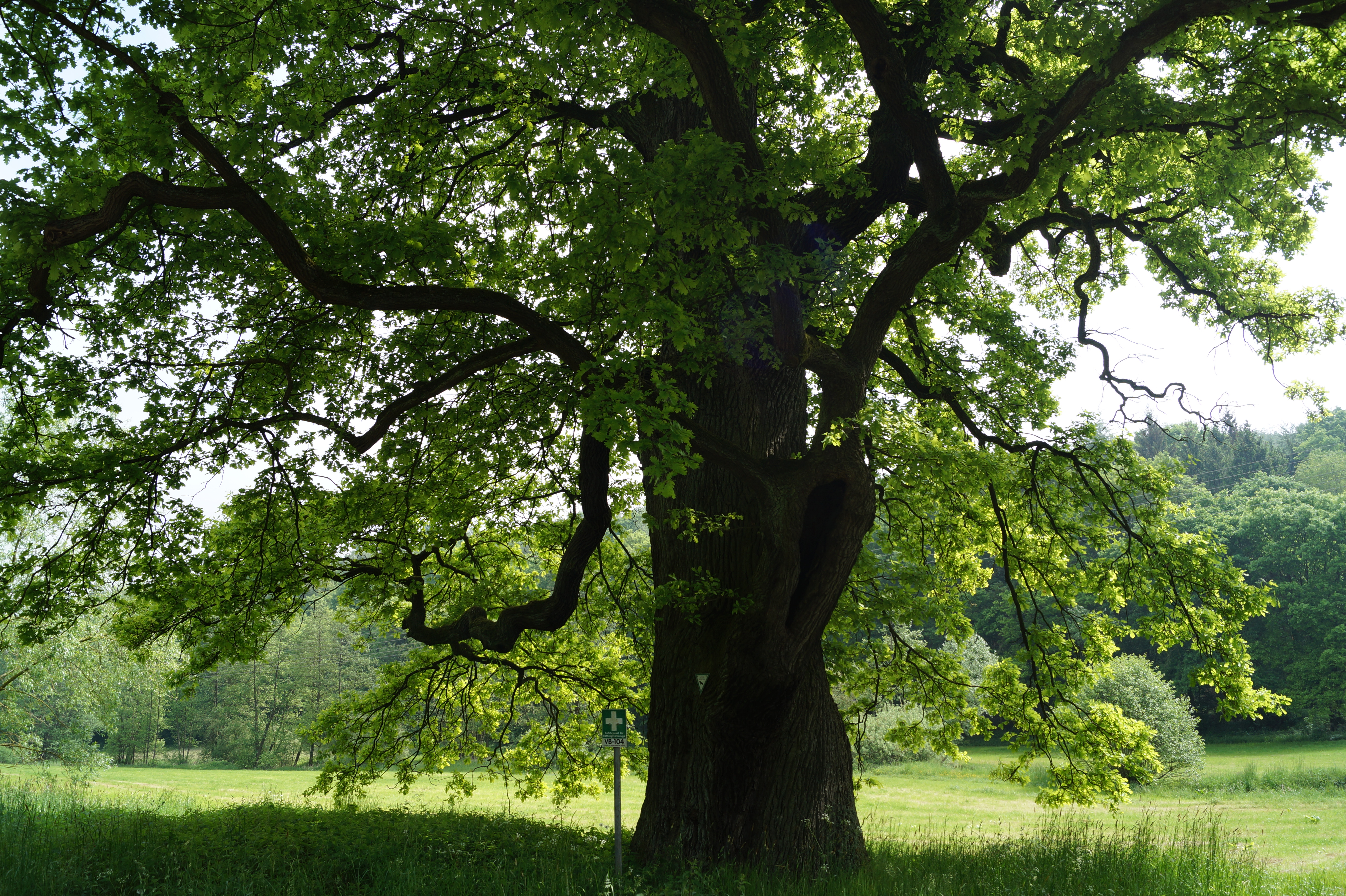 Die Saueiche von Büßfeld (Naturdenkmal) ist an der Straße zwischen Büßfeld und Homberg (Ohm) vorzufinden. Sie wird zwischen 400 und 500 Jahre alt geschätzt.